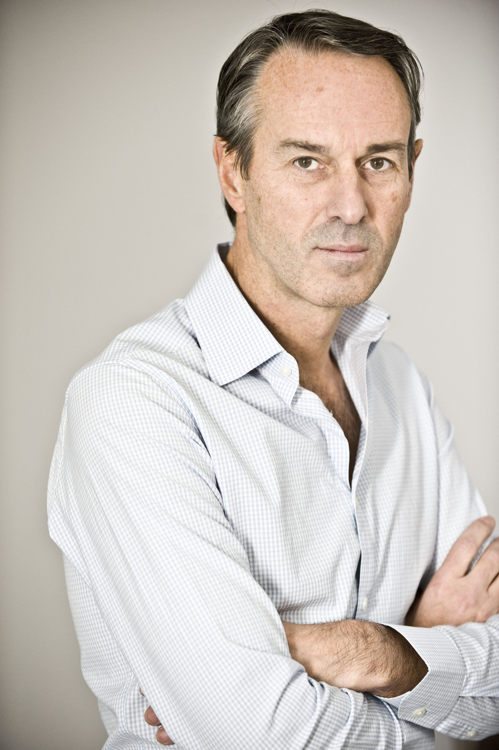 Ivo van Hove, Vlaamse toneelregisseur.